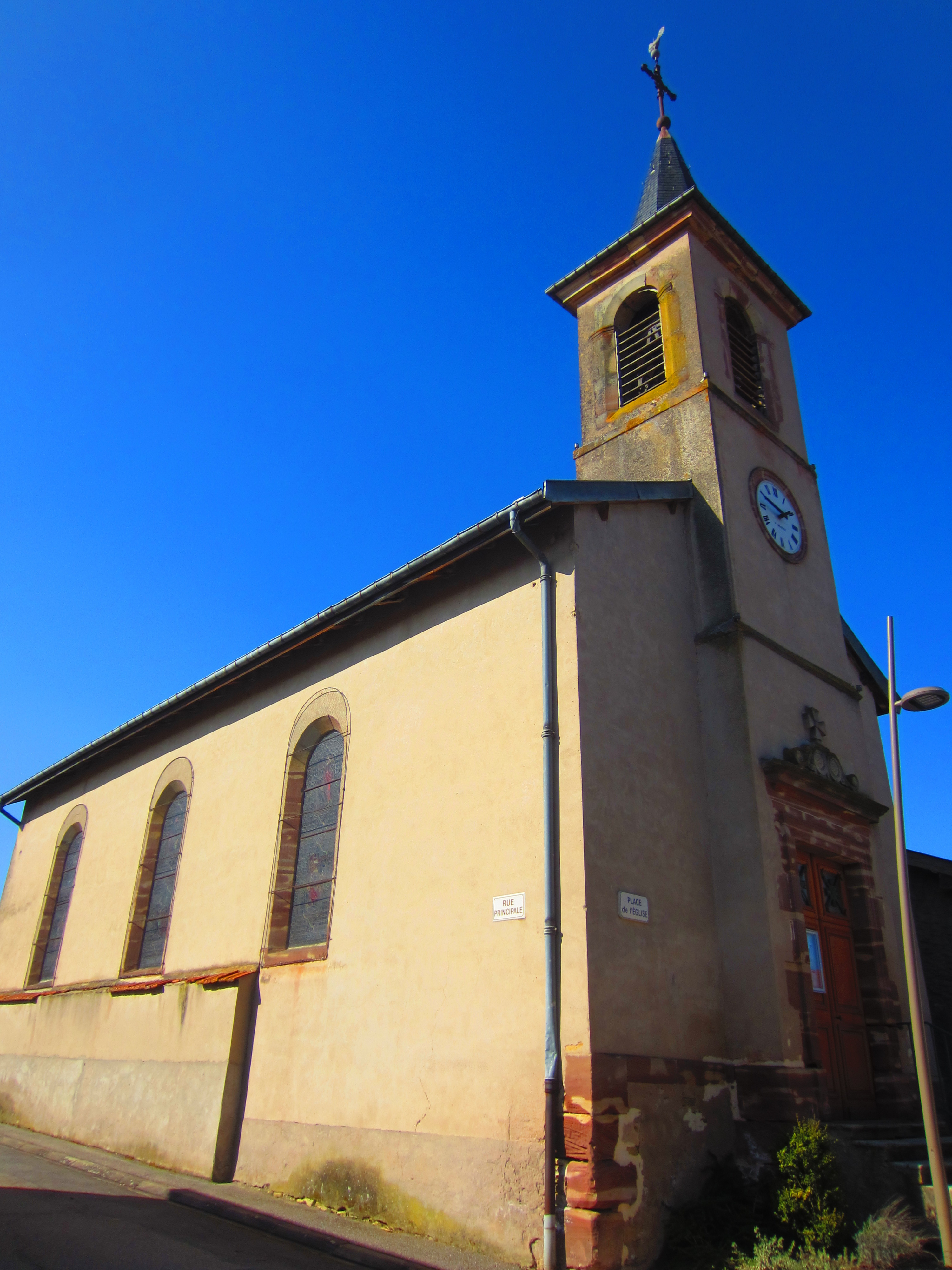 Lamath eglise